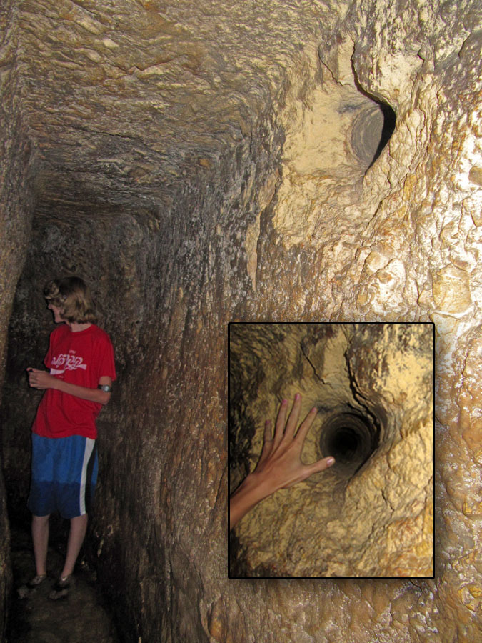 A hole made by a mindless resident in Siloam village, who renovated his house above Hezekiah's Tunnel חור שנעשה בידי תושב לא זהיר בכפר סילואן, ששיפץ את ביתו מעל נקבת השילוח